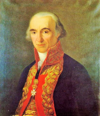 Retrato de José de Ezpeleta y Galdeano (1739–1823), Virrey de Nueva Granada.